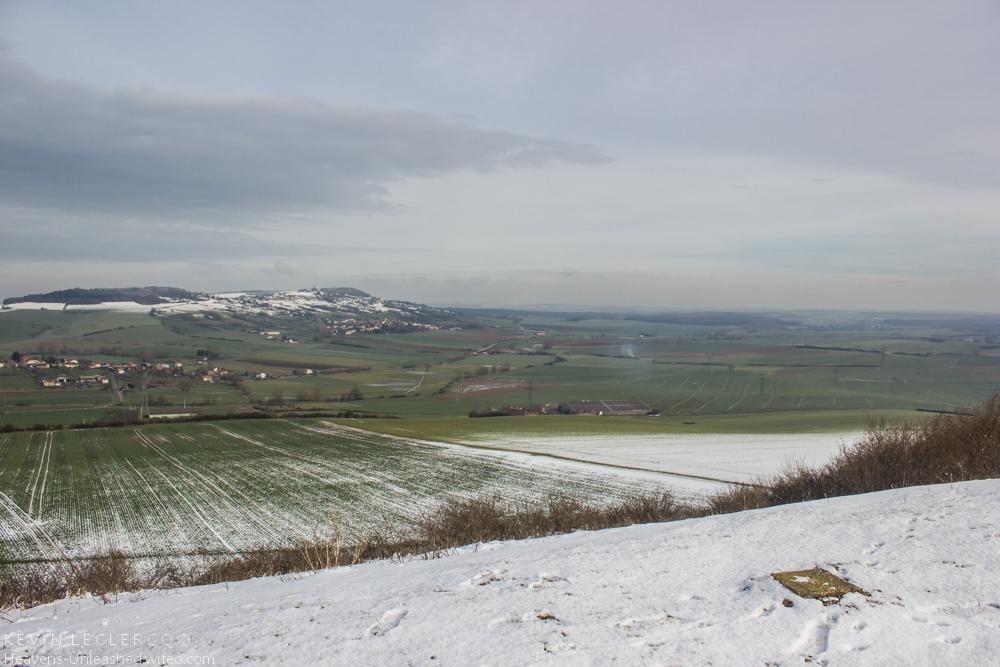 Le village d'Amance vu depuis la butte du Pain de Sucre